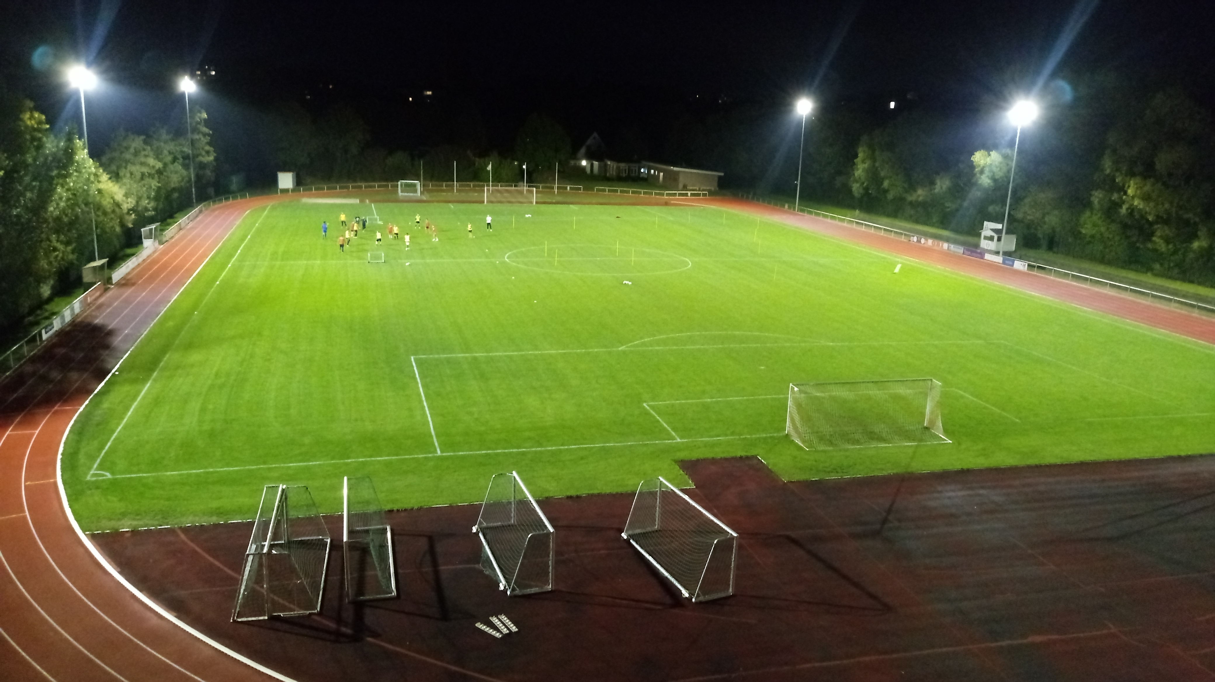 Beleuchtetes Sportstadion mit energieeffizenter LED Technologie nach Vorgaben eines Lichtdesigners